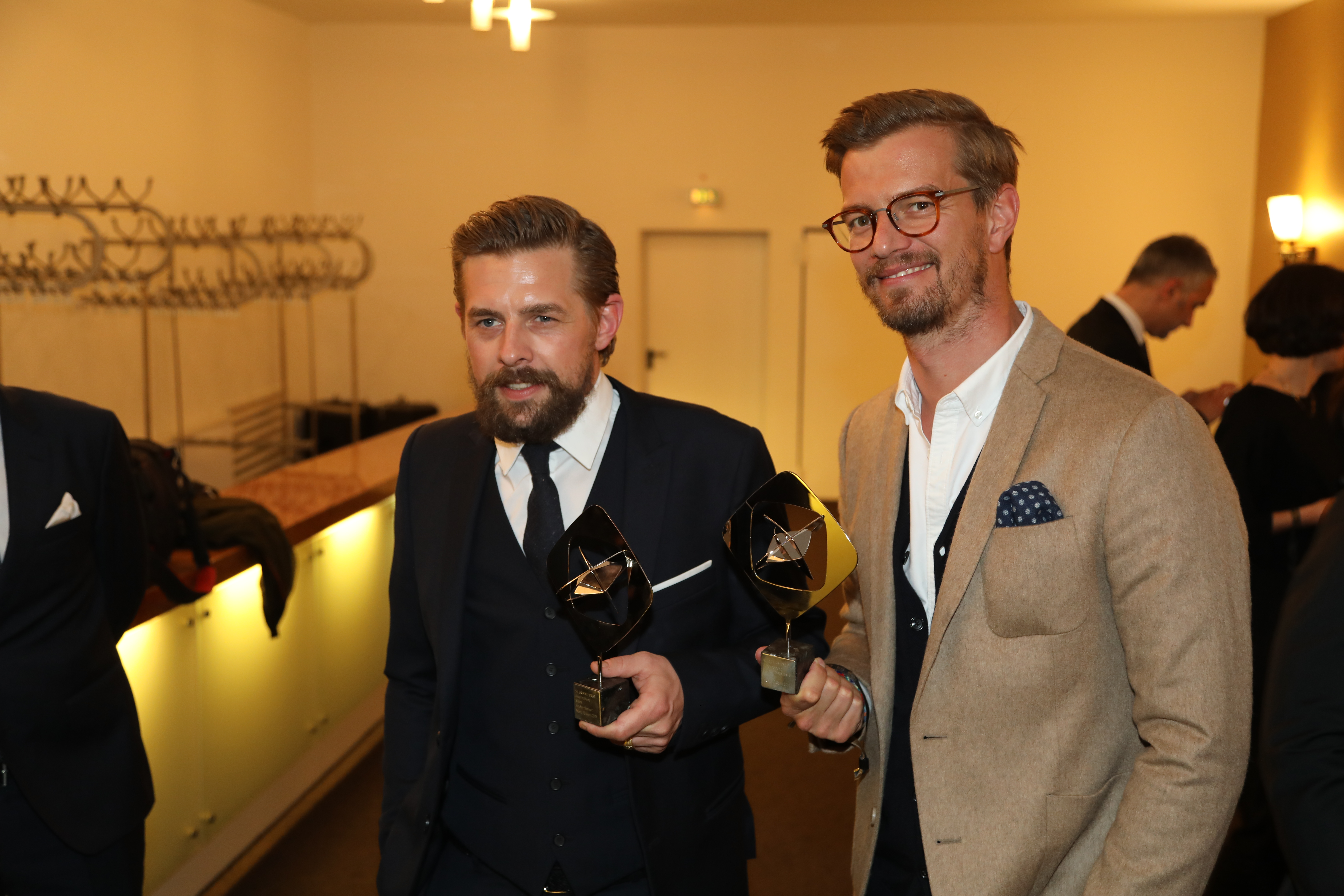 Klaas Heufer-Umlauf und Joko Winterscheidt bei der Grimme-Preis-Verleihung 2018